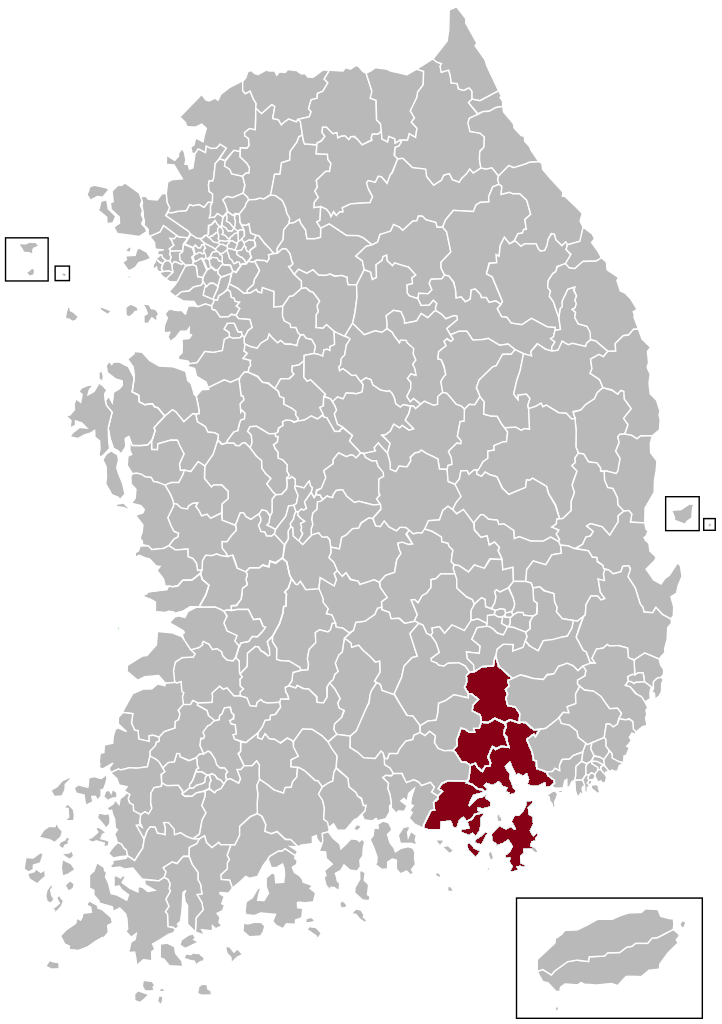 창원우편집중국 관할구역 지도